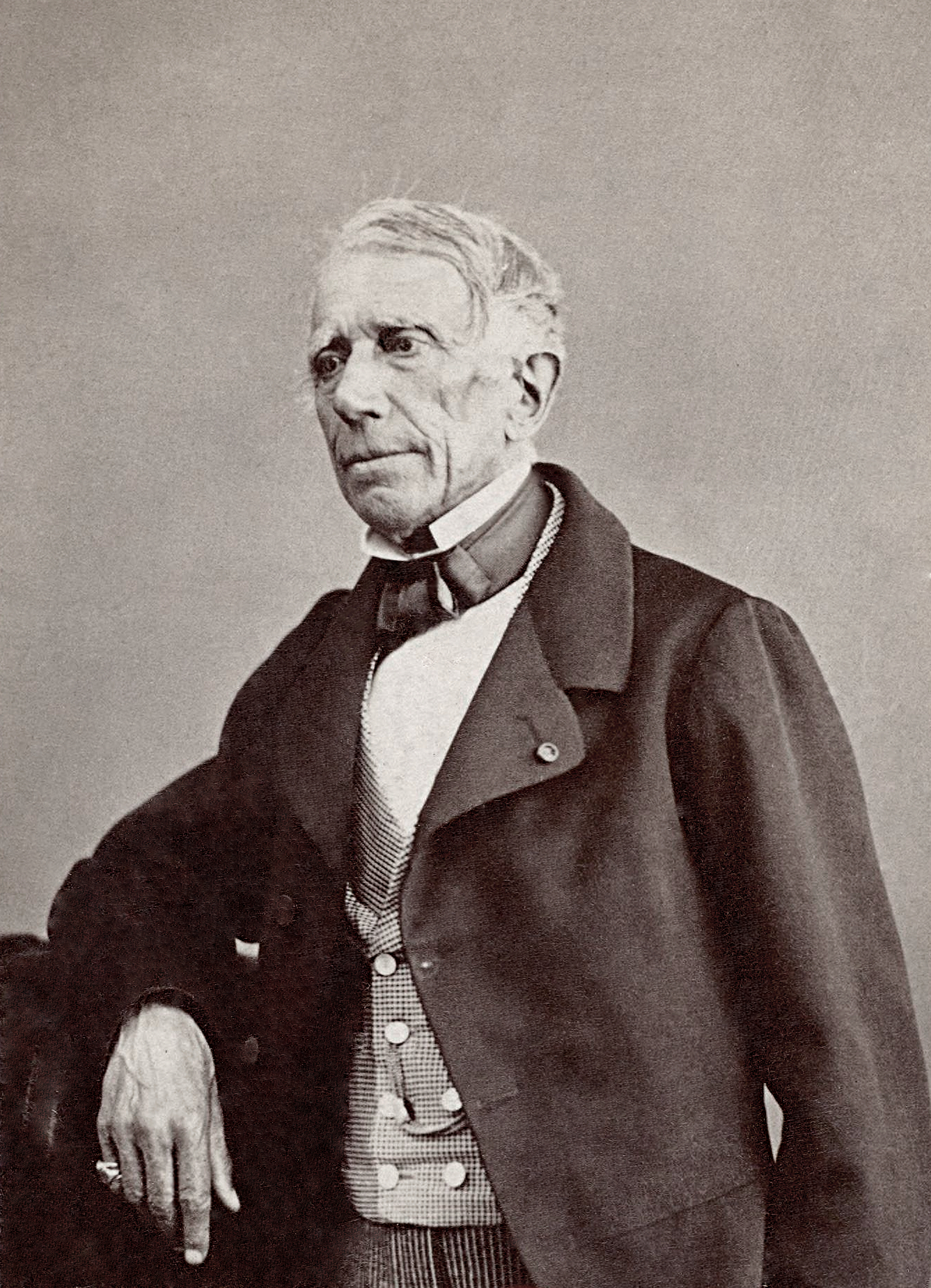 Mélesville. Anne-Honoré-Joseph Duveyrier, dit (1787 ou 88 ? - 1865), auteur dramatique français.